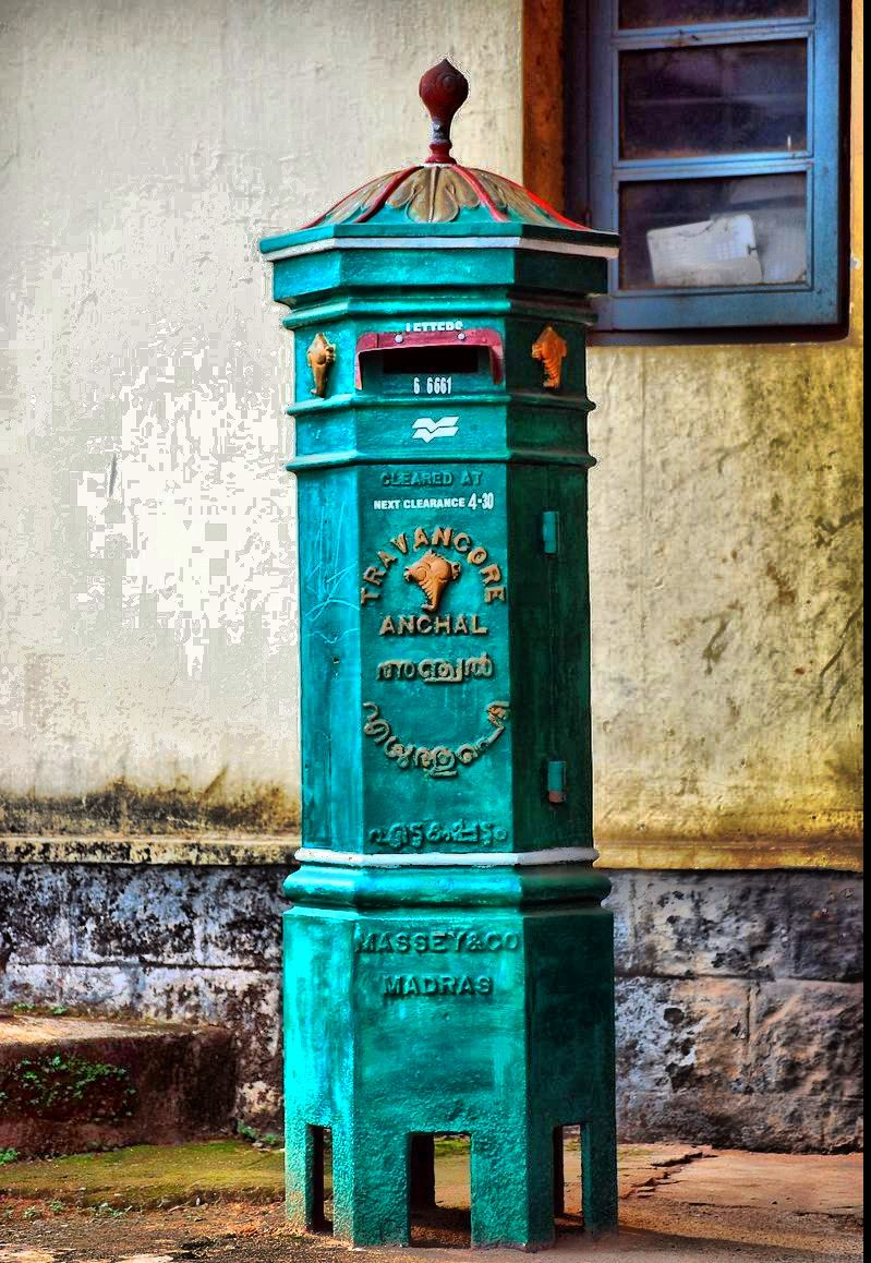 Travancore Anchal post box